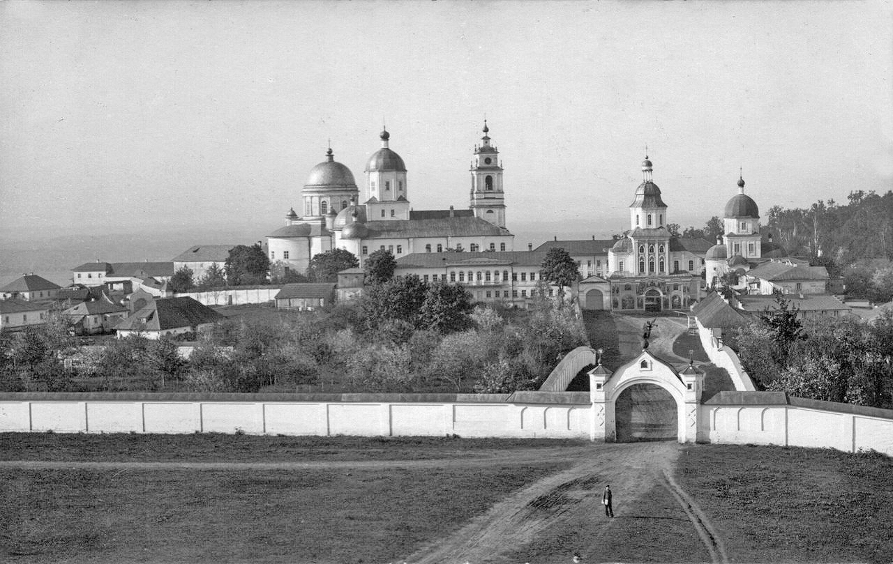 Софрониевский монастырь. Путивль